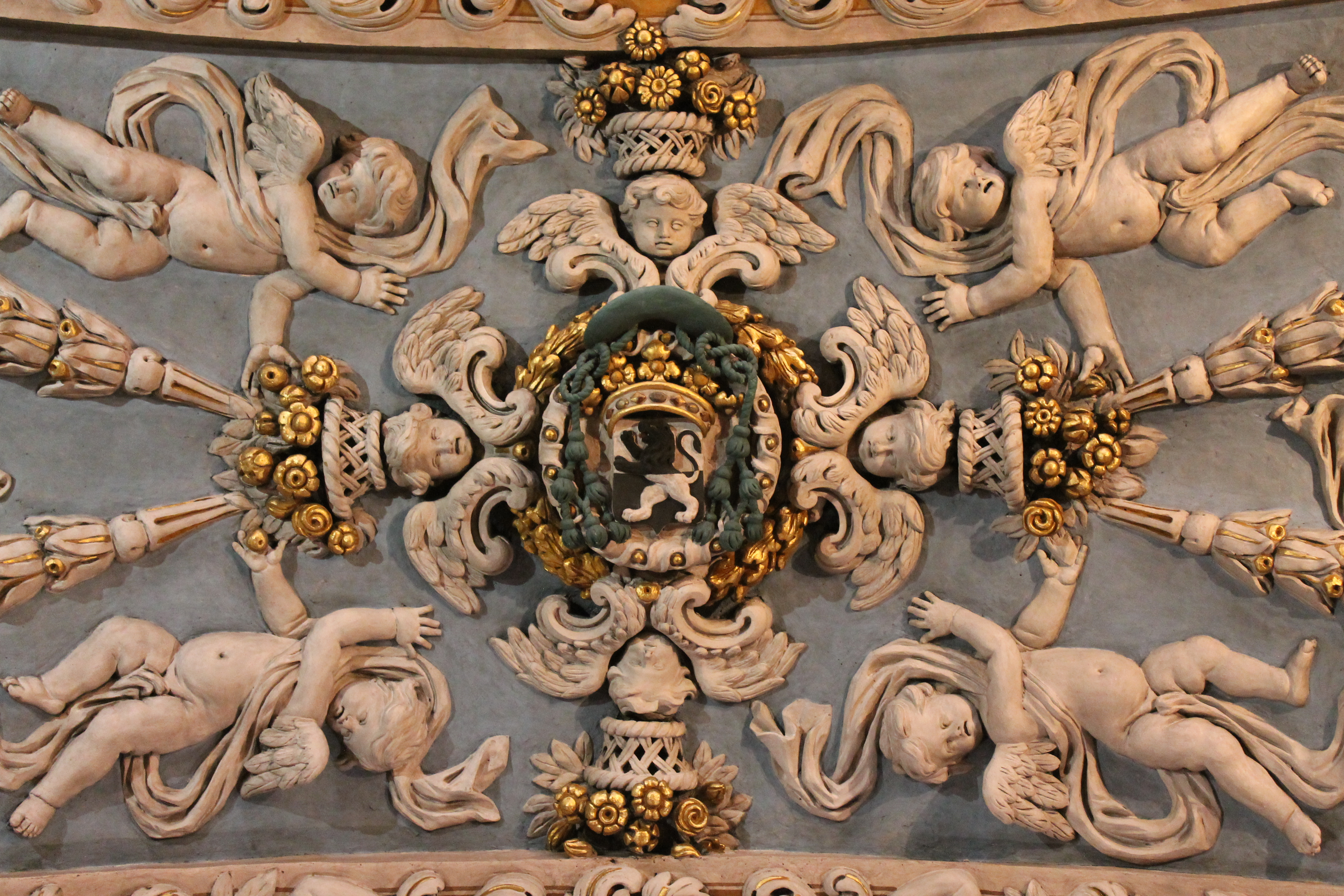 Détail des gypseries de l’ église de Valloire, armes de Mgr Berzetti, "coupé de sable et d'argent, au lion de l'un en l'autre, sommé d'une couronne de marquis"(août 2018).